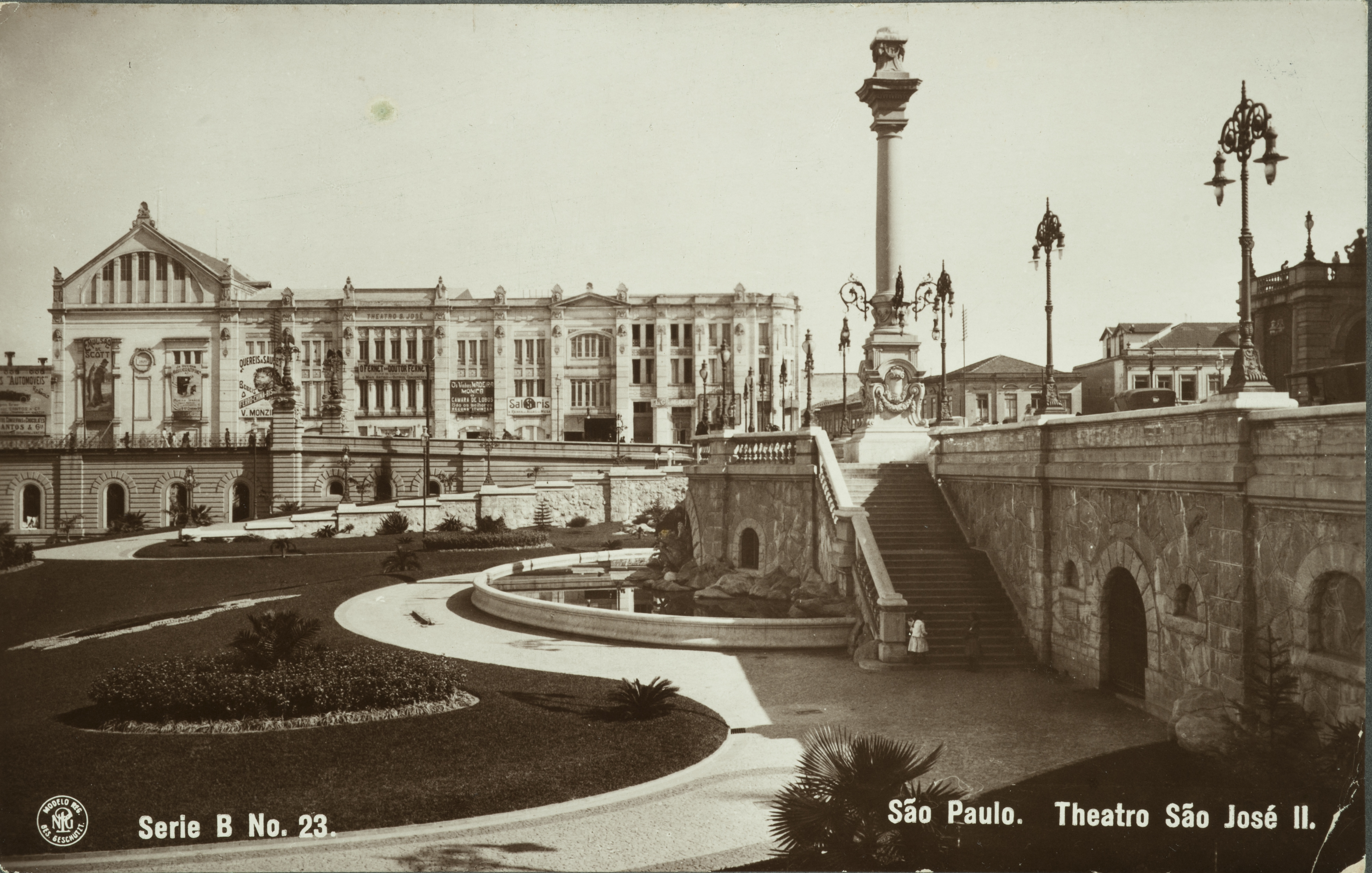 Obra que integra o acervo do Museu Paulista da USP.